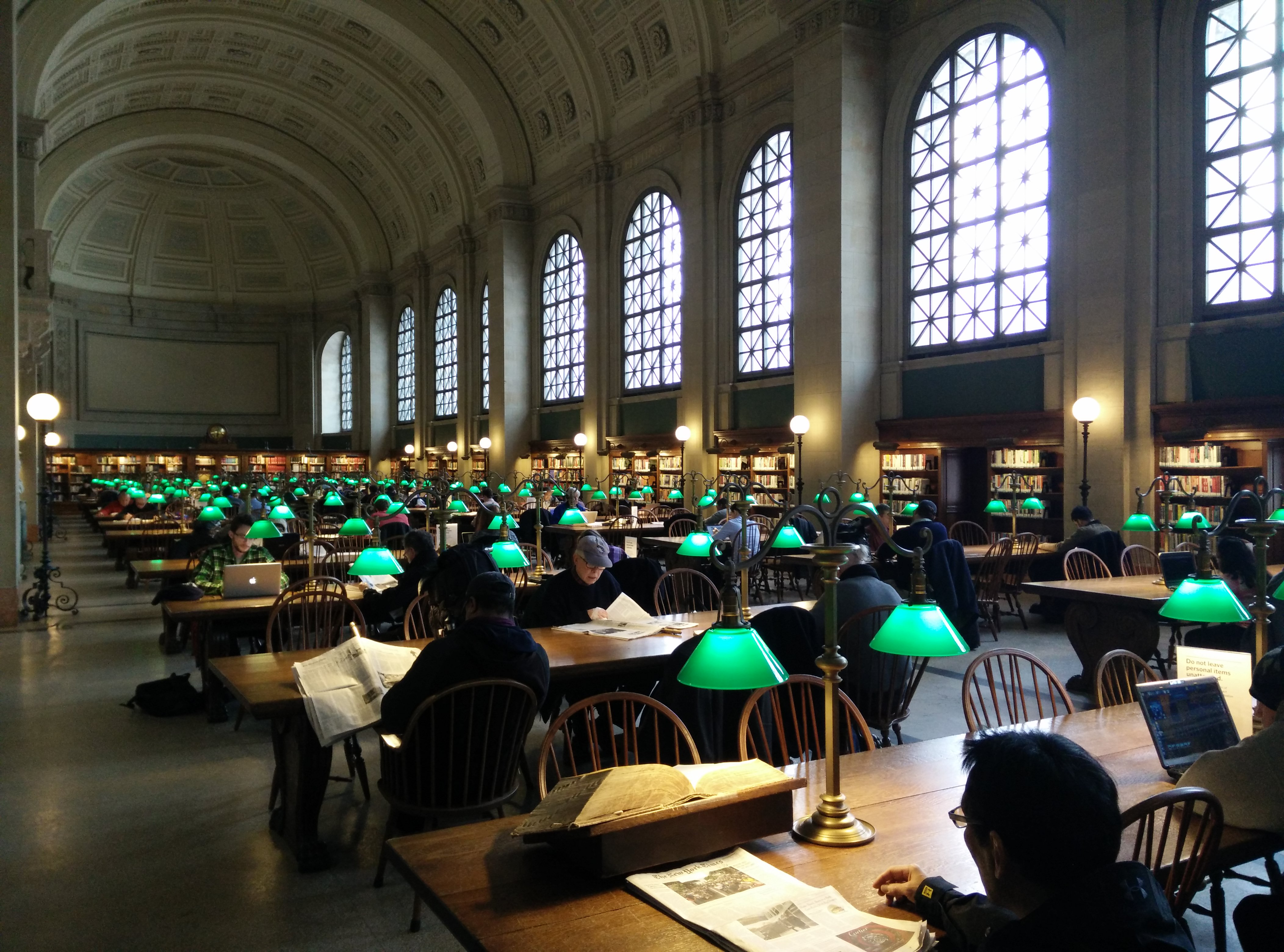 הספריה הציבורית בבוסטון